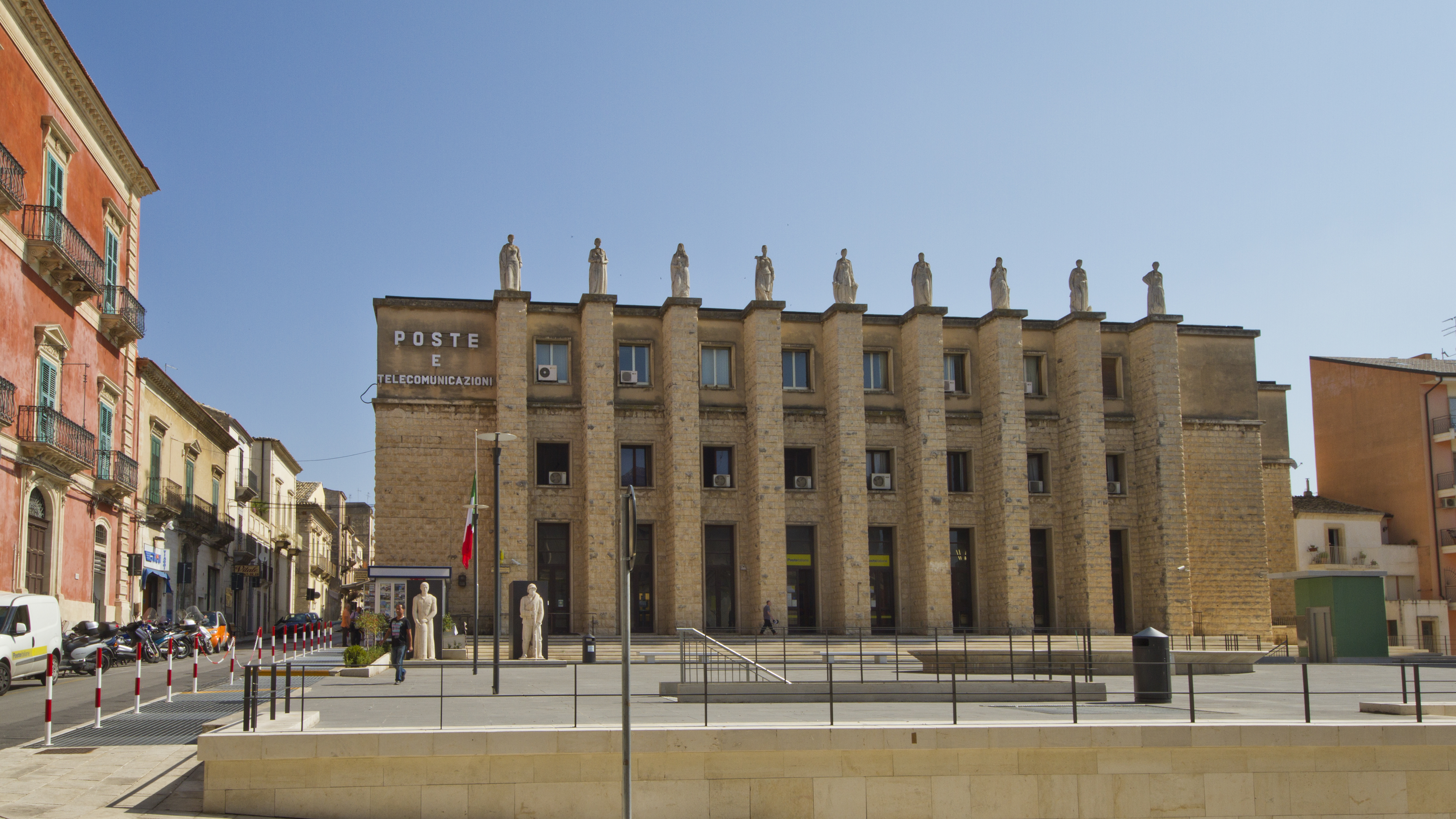 Poste e Telecomunicazioni